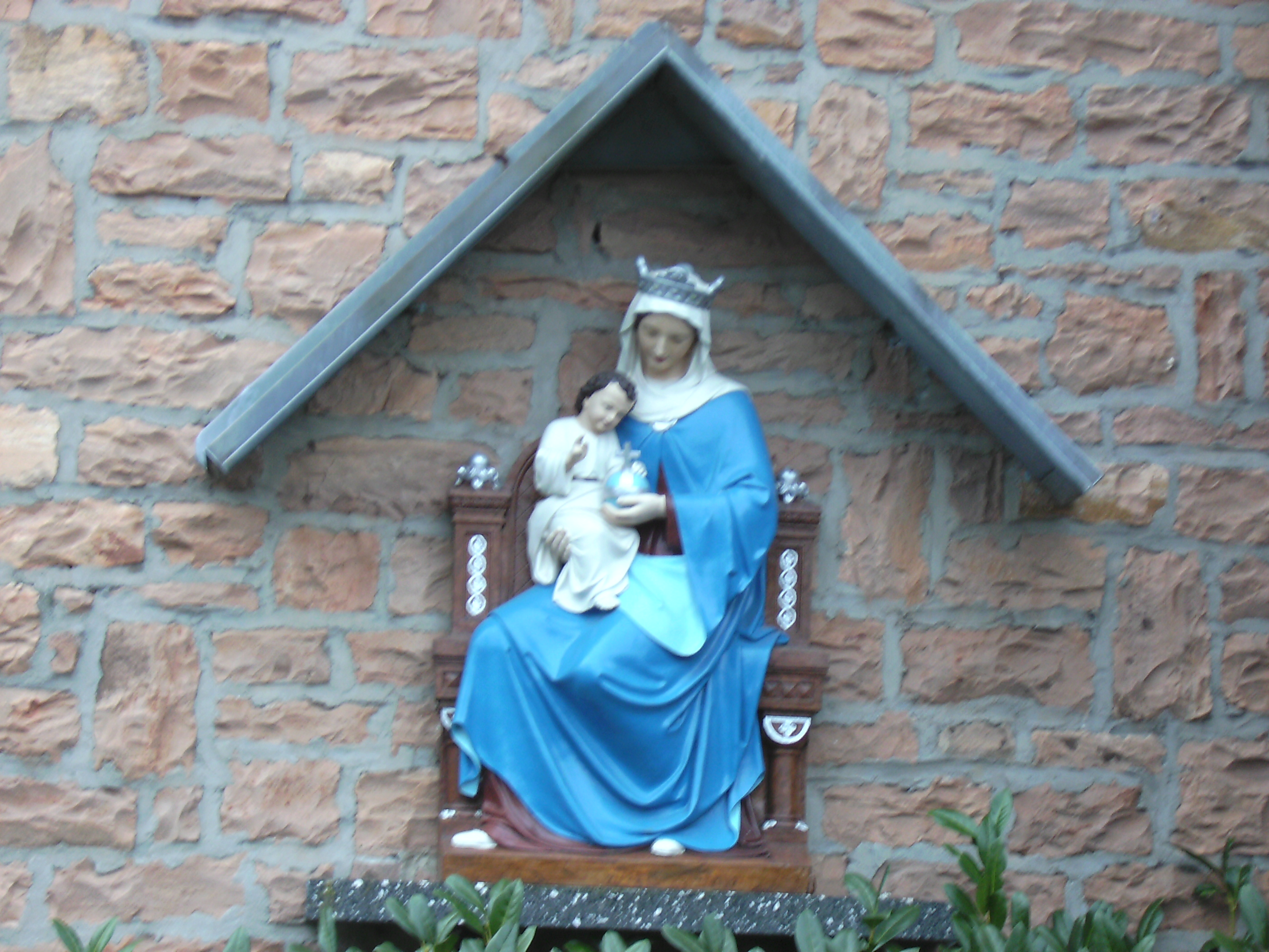 Walhausen (Saar): "Blaue Madonna" an der Außenwand der Kirche